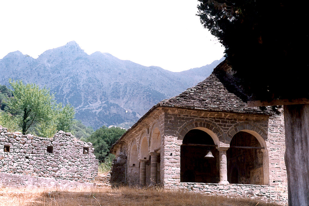 Ιστορική Μονή από το 1821 και την Εθνική Αντίσταση. Κινδυνεύει με ολοκληρωτικό καταποντισμό αν γίνει η εκτροπή του Αχελώου